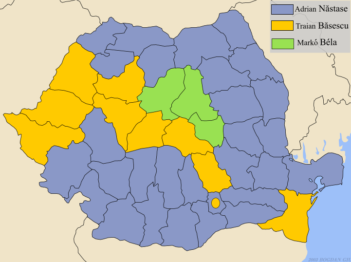 Stimmenstärkste Kandidaten nach Kreisen (erster Wahlgang).